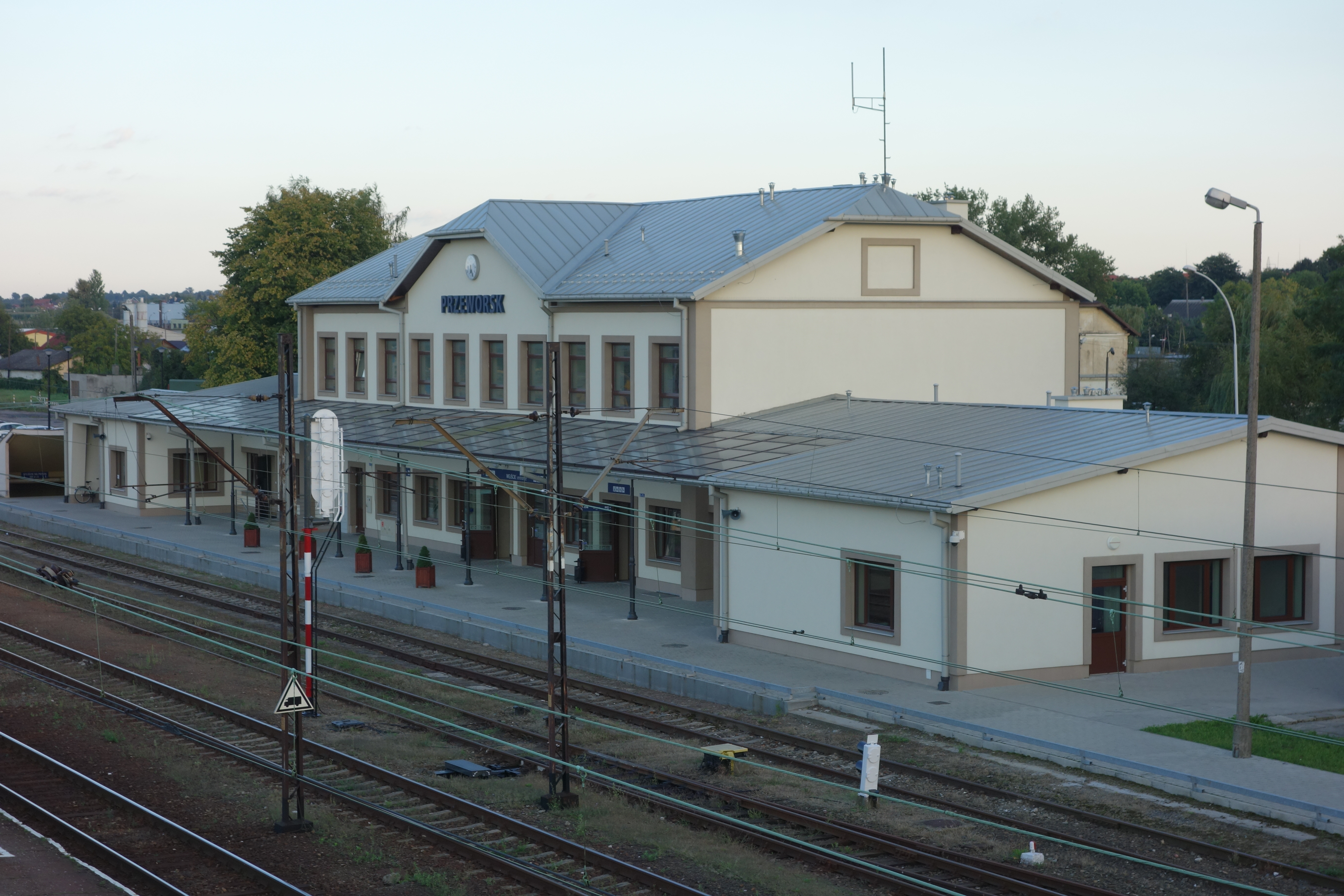 Przeworsk - dworzec kolejowy This photo was taken during Railway Wikiexpedition 2014 set up by Wikimedia Polska Association. You can see all photographs in category Wikiekspedycja kolejowa 2014. English | Polski | +/−